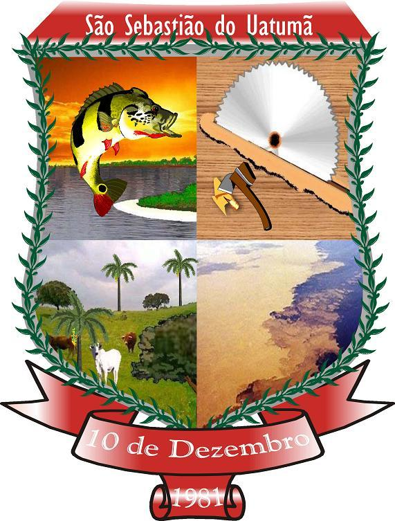 Brasão do Municipio de São Sebastião do Uatumã, Criado por Jean Itamar Nogueira da Silva, em 18 de março de 2008 e aprovado pela Câmara de Vereadores como Simbolo do Municipio.